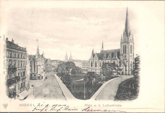 Die Kasseler Lutherkirche auf einer Ansichtskarte, die 1900 geschrieben wurde